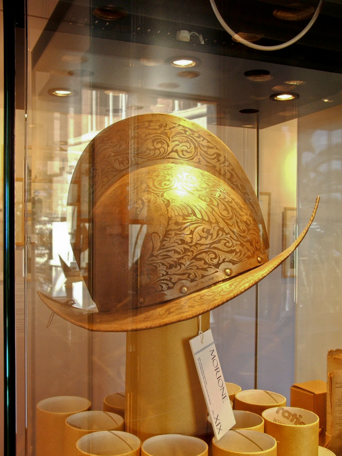 Immagine dalla città di Genova Un morione esposto nel Castello d'Albertis - interni